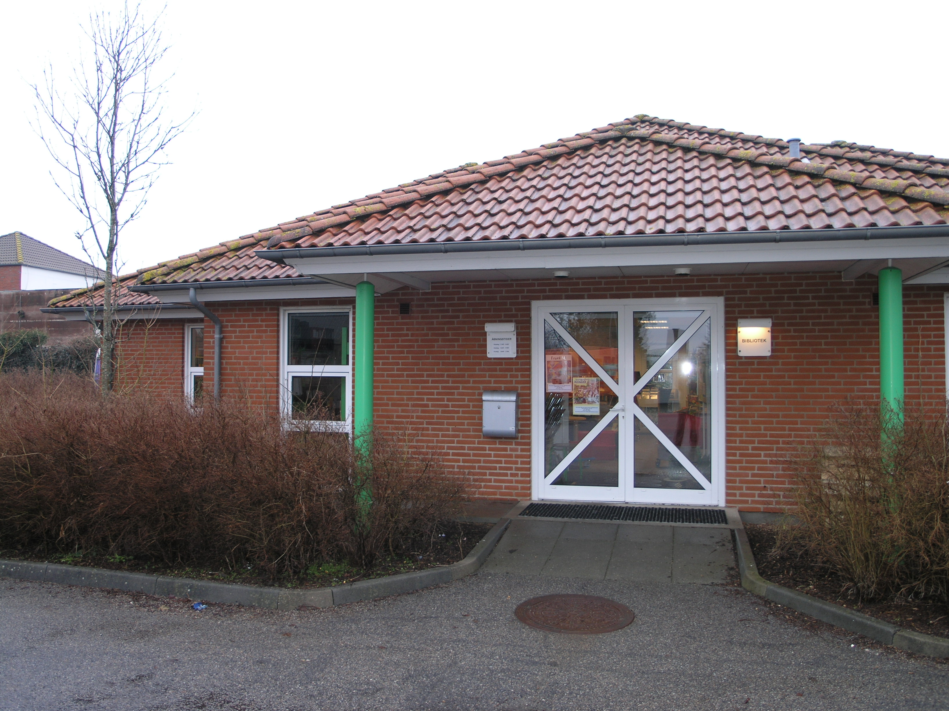 Agerbæk Bibliotek - indgang